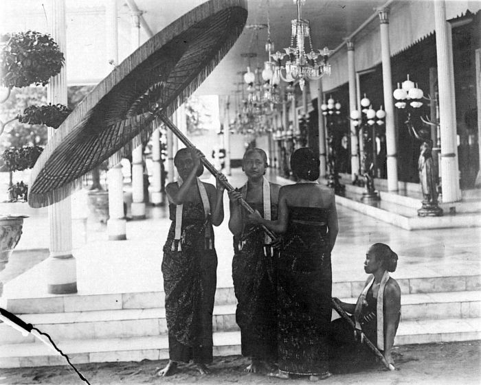 Repronegatief. De grote pajong van de vorst Soesoehoenan van Solo, Surakarta, Java